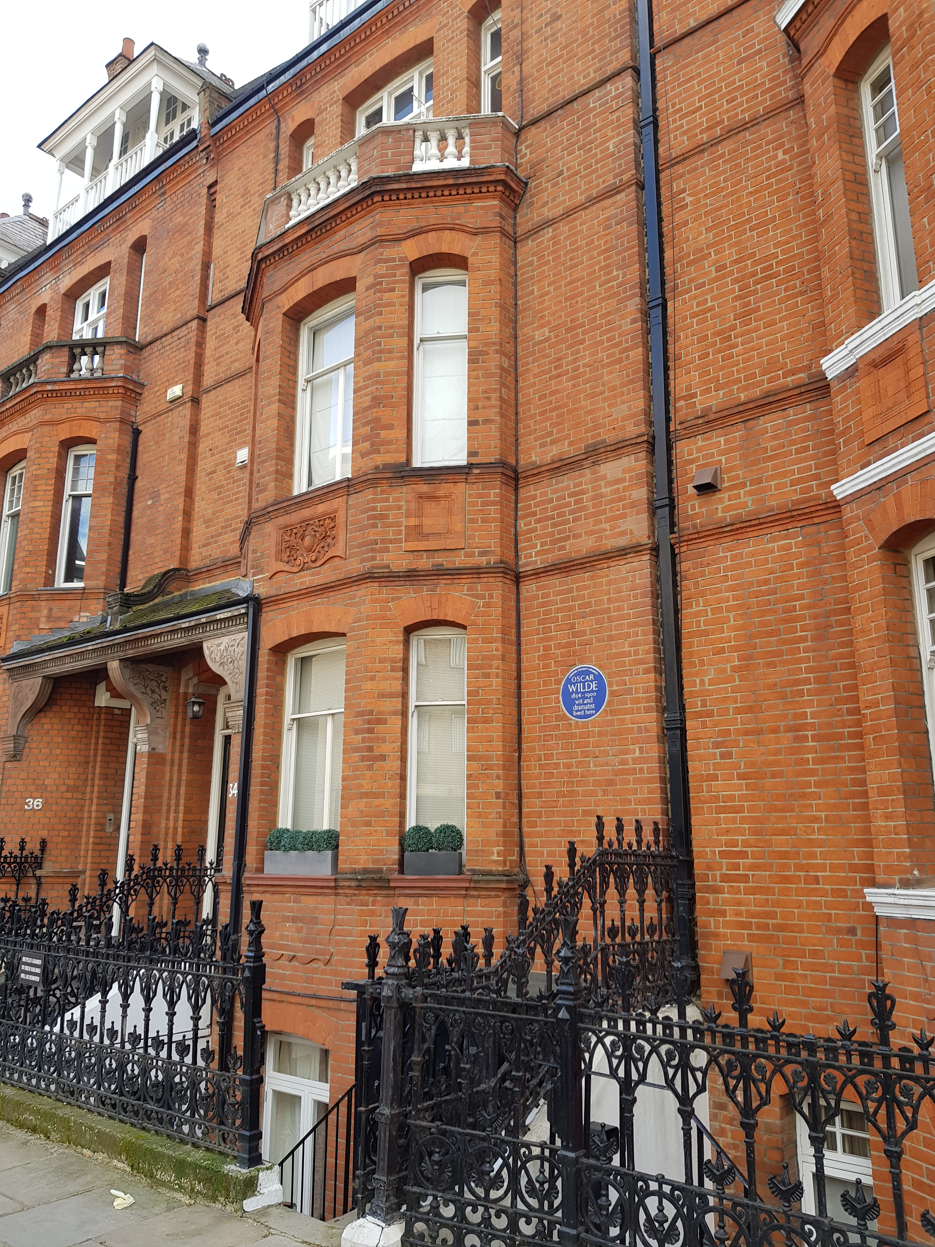 34 Tite Street, Londres. Maison où vécut l'écrivain Oscar Wilde.